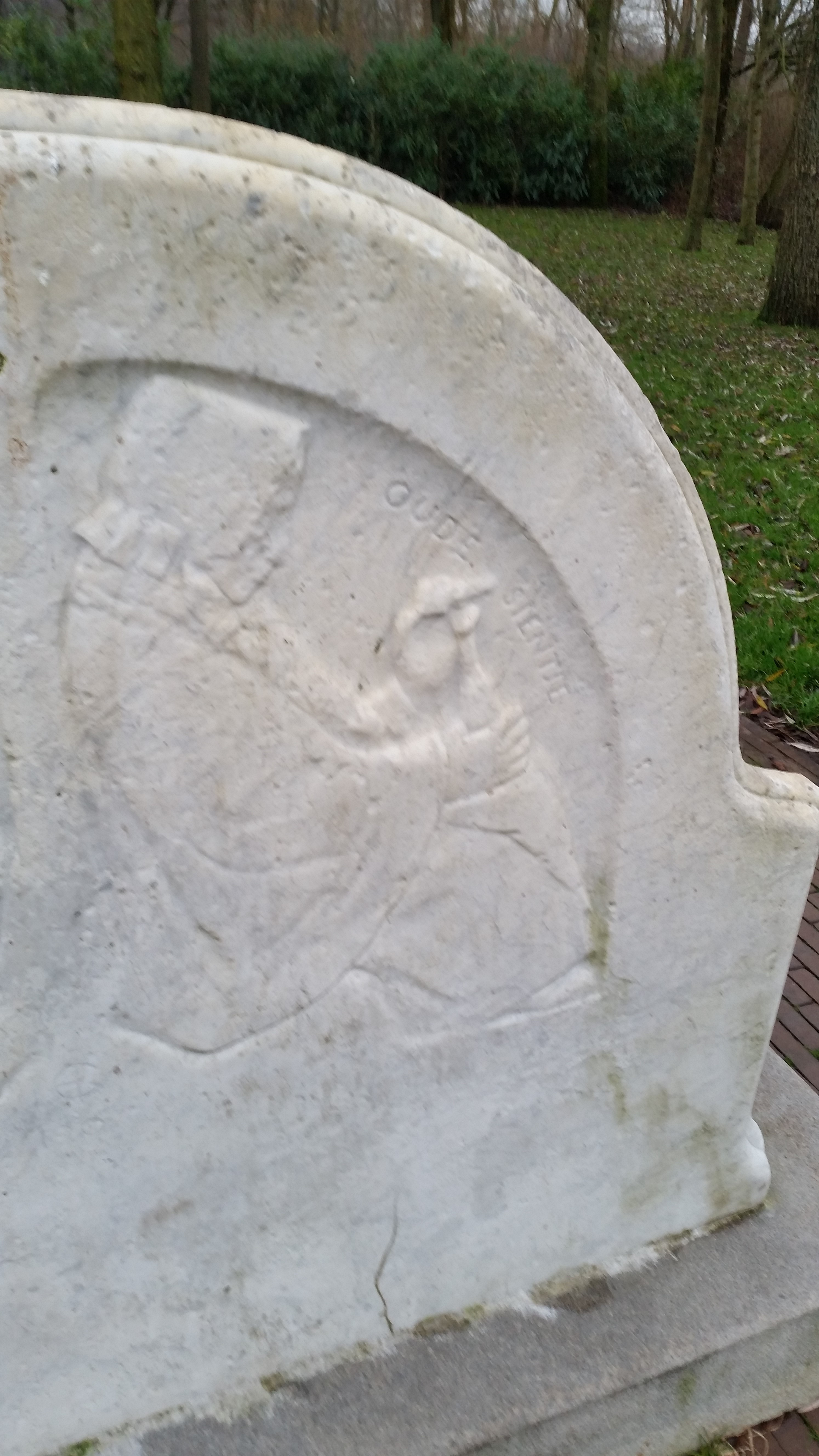 Impressies van de Justus van Maurikbank, Oosterpark, Amsterdam, december 2019